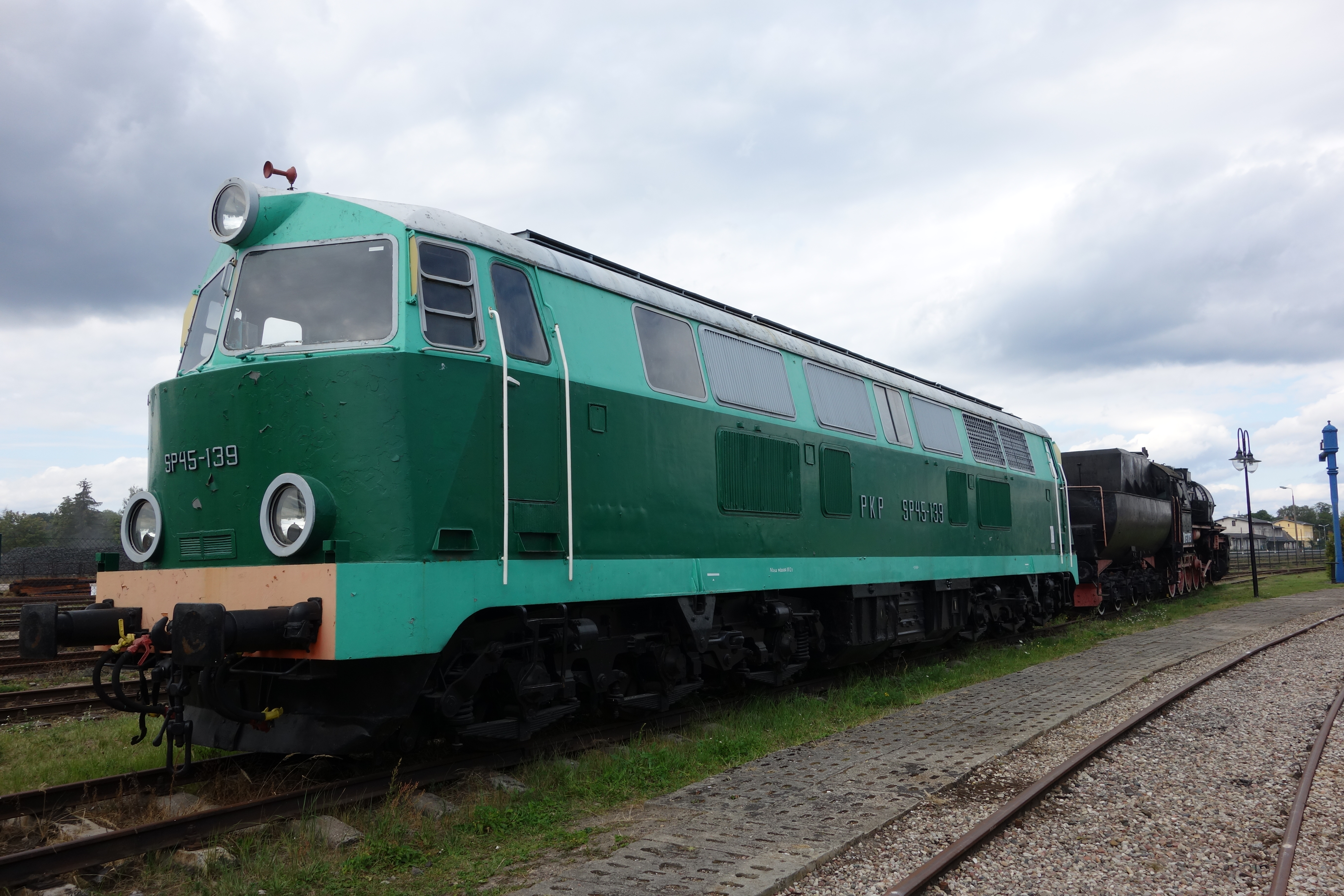 Kościerzyna - Muzeum Kolejnictwa - lokomotywa spalinowa SP45-139 This photo was taken during Railway Wikiexpedition 2014 set up by Wikimedia Polska Association in cooperation with Fundacja Grupy PKP. You can see all photographs in category Wikiekspedycja kolejowa 2014.